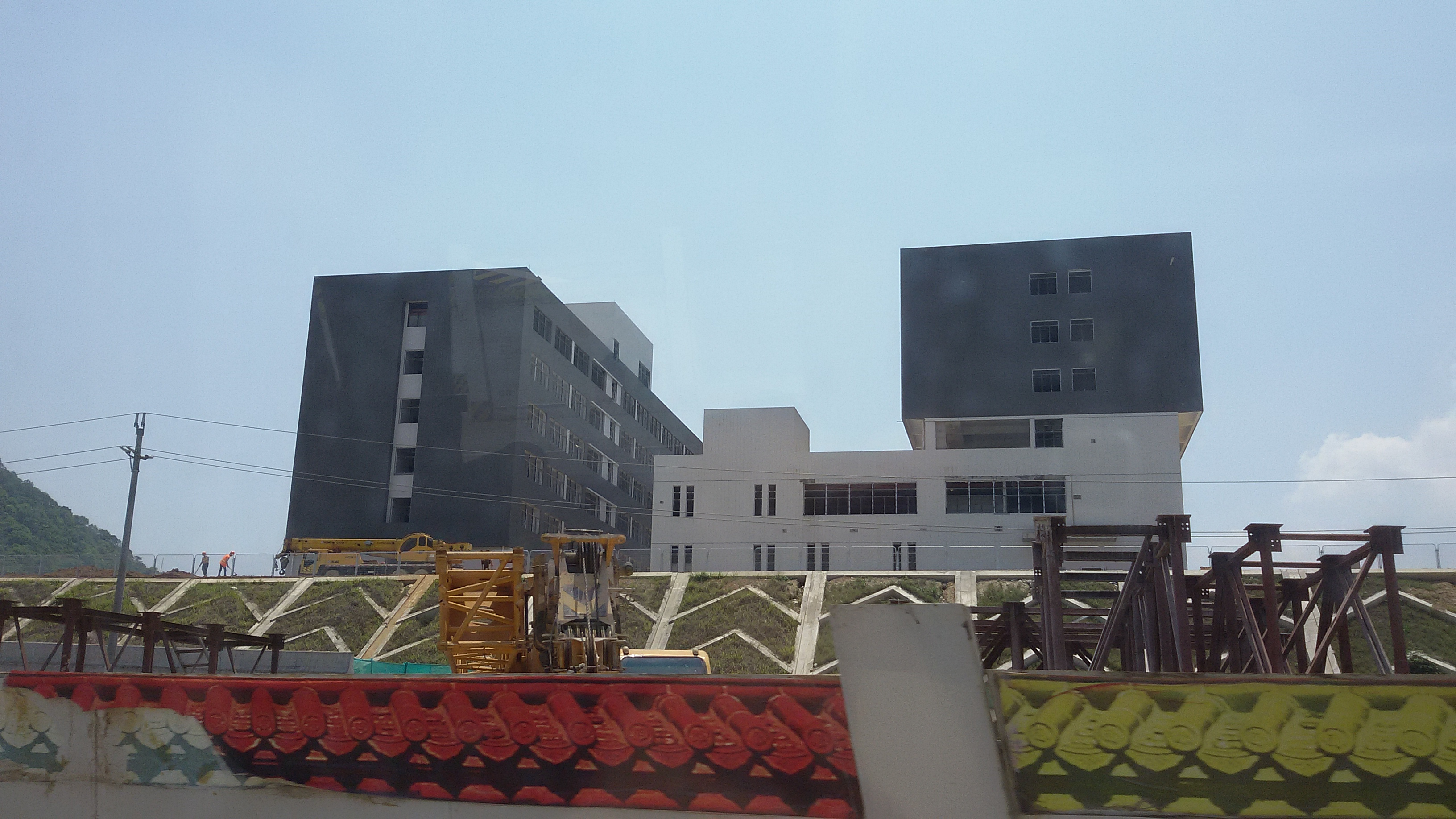 粵語: 邓村停车场